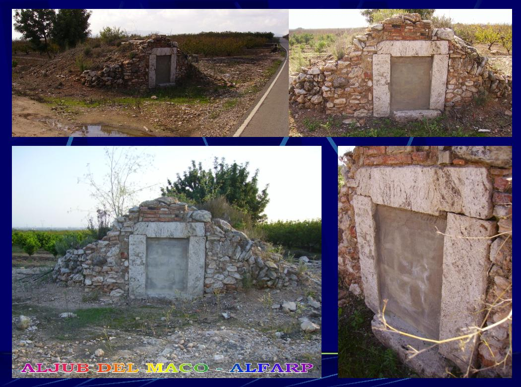 Deposito de agua de 1900